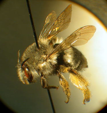 Habropoda miserabilis female